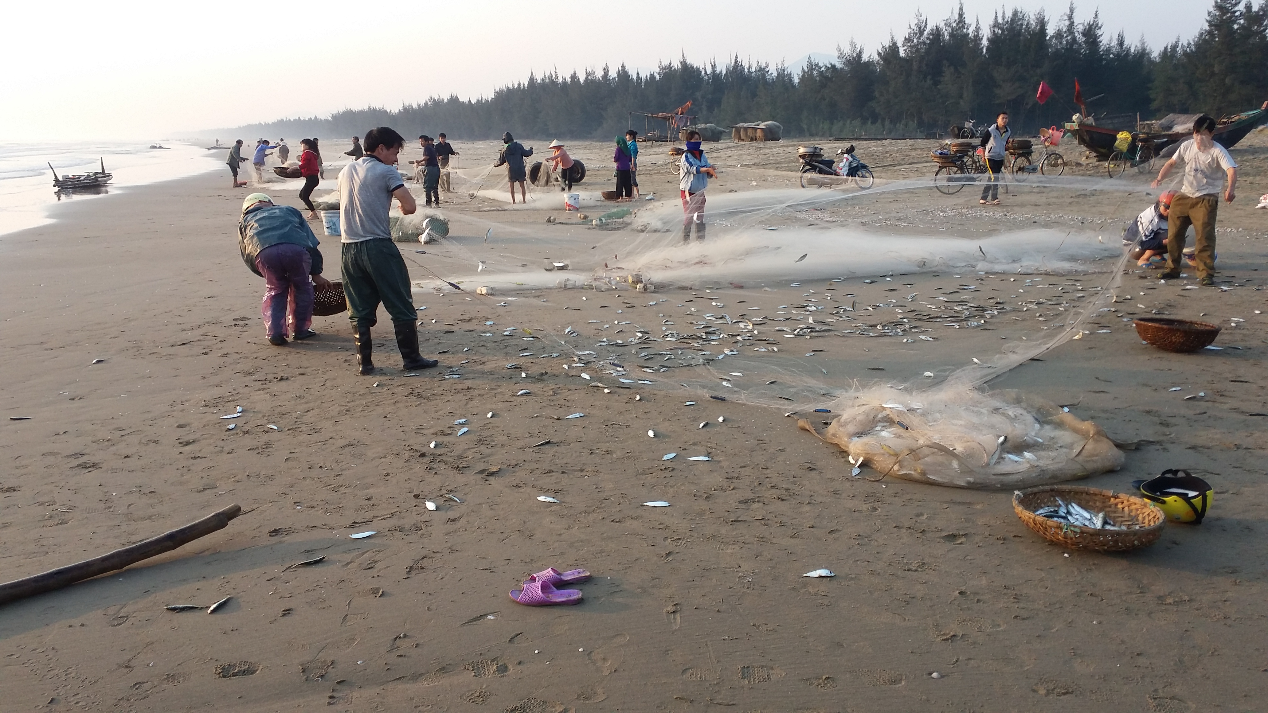 Ngư dân đánh bắt cá